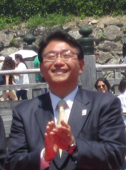 第70回姫路お城まつりに参加する姫路市市長の清元秀泰。 切り抜き前のオリジナル写真はHimeji Oshiro Matsuri May 2019 06.jpg。